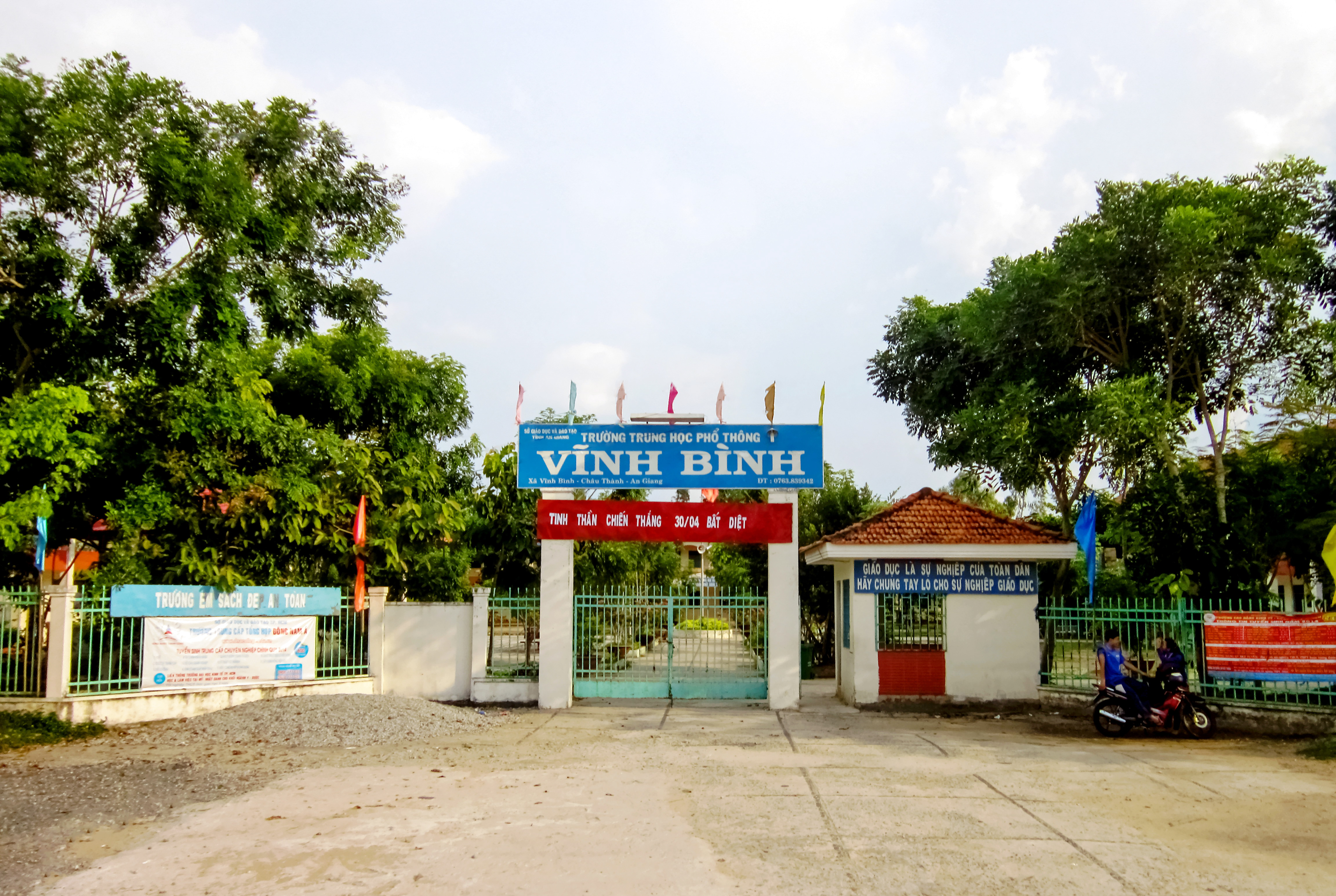 Trường Trung học phổ thông Vĩnh Bình ở xã Vĩnh Bình, huyện Châu Thành, tỉnh An Giang, Việt Nam.